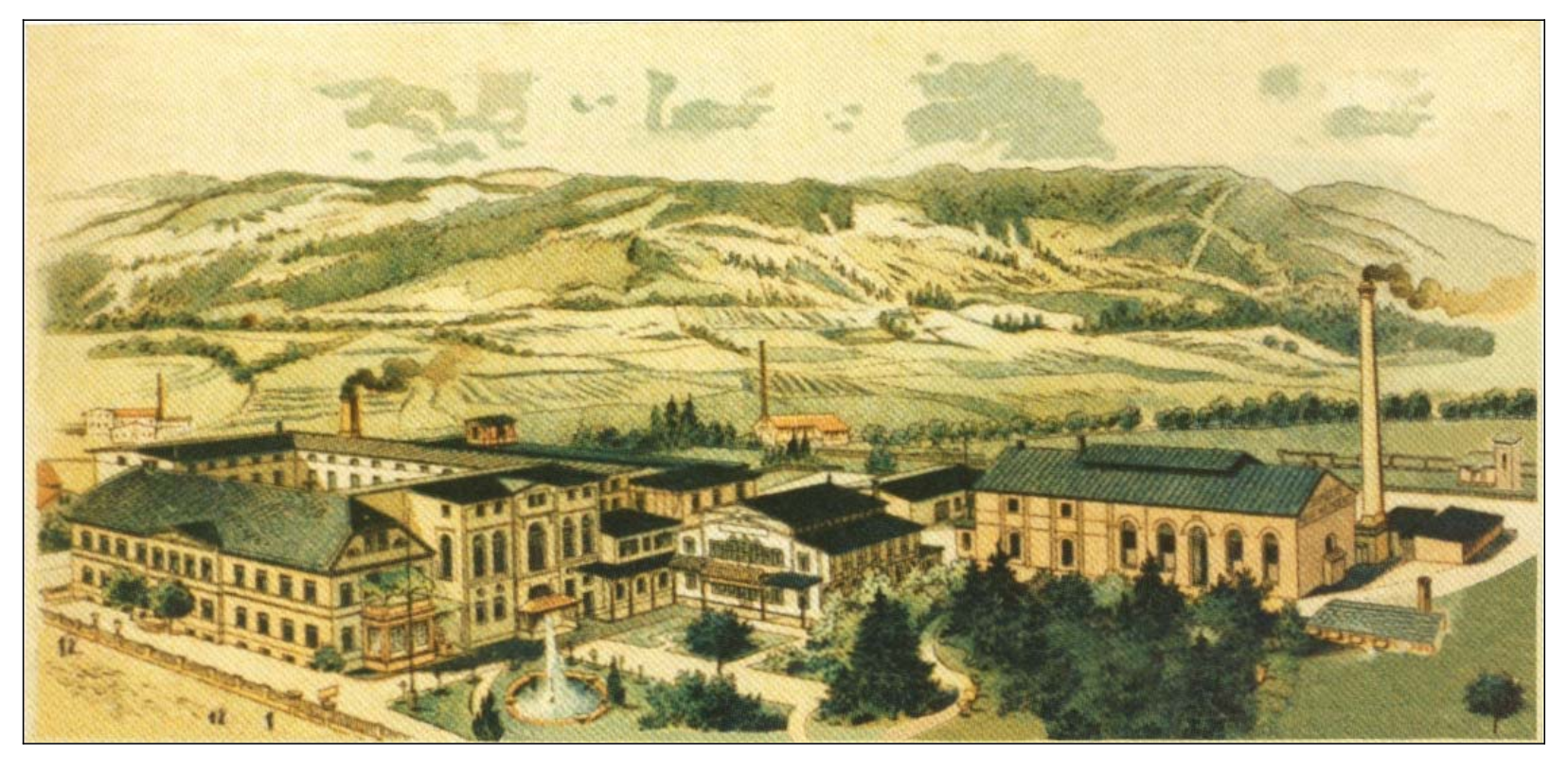 "Glashütte Fritz Heckert" in Petersdorf (vermutlich Ende des 19. Jh.), Postkarte, Museum Karkonoskie in Jelenia Góra.